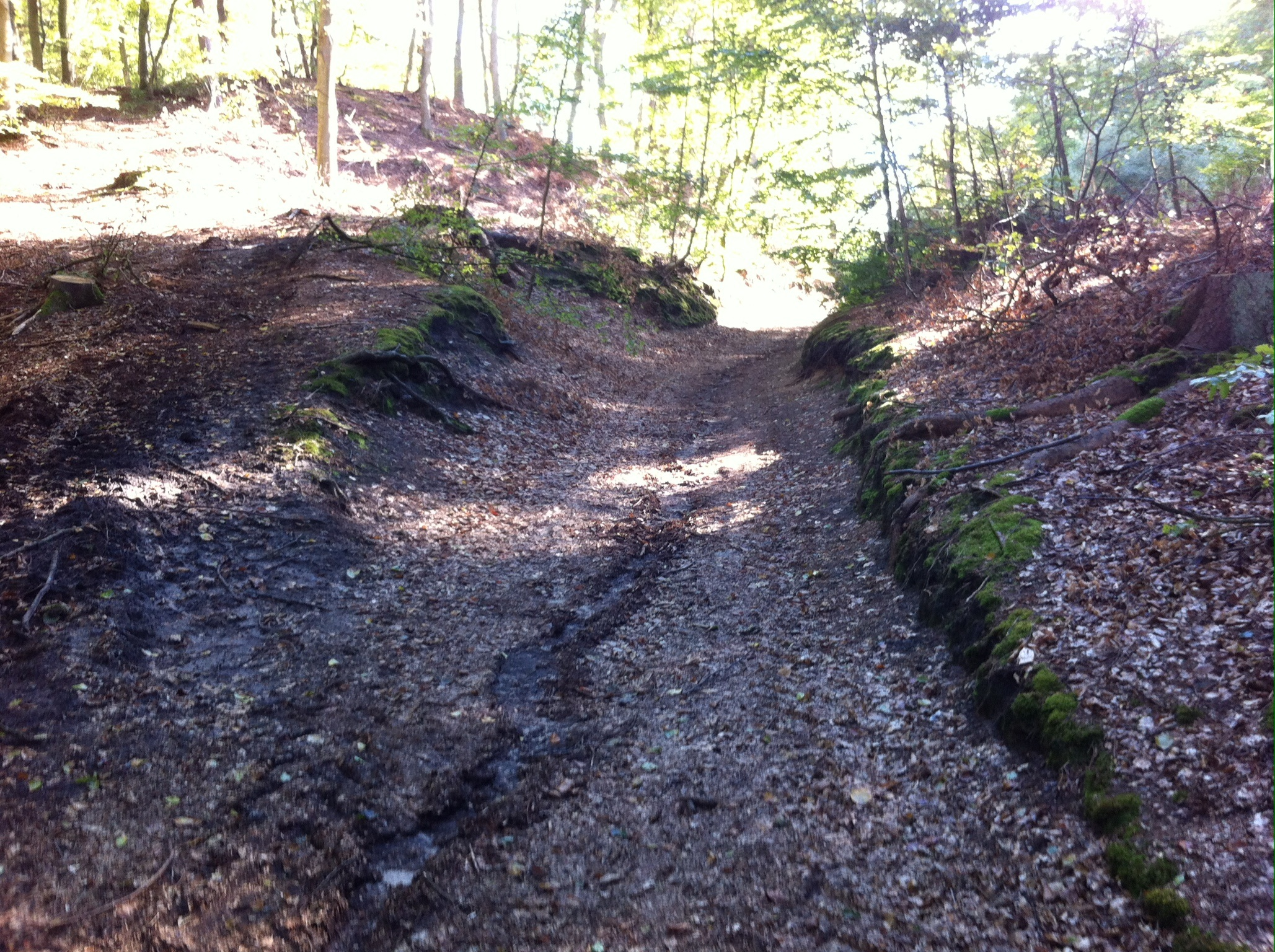 Nedlagt vej i Linddalene ved Hadsund.